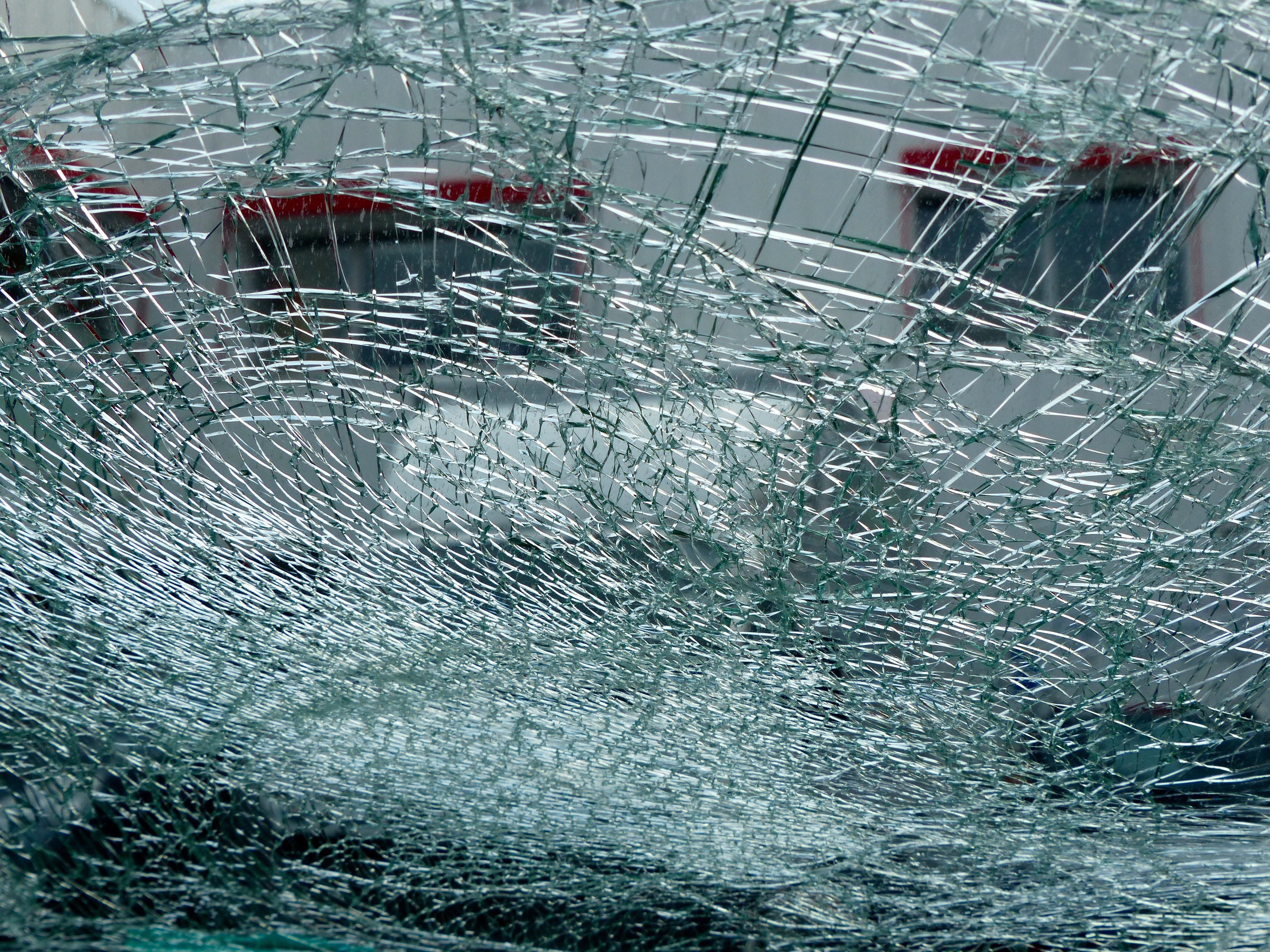 Sicherheitsverbundglas in einer Windschutzscheibe nach Einschlag einer losgelösten Eisplatte von einem LKW (Innenansicht)